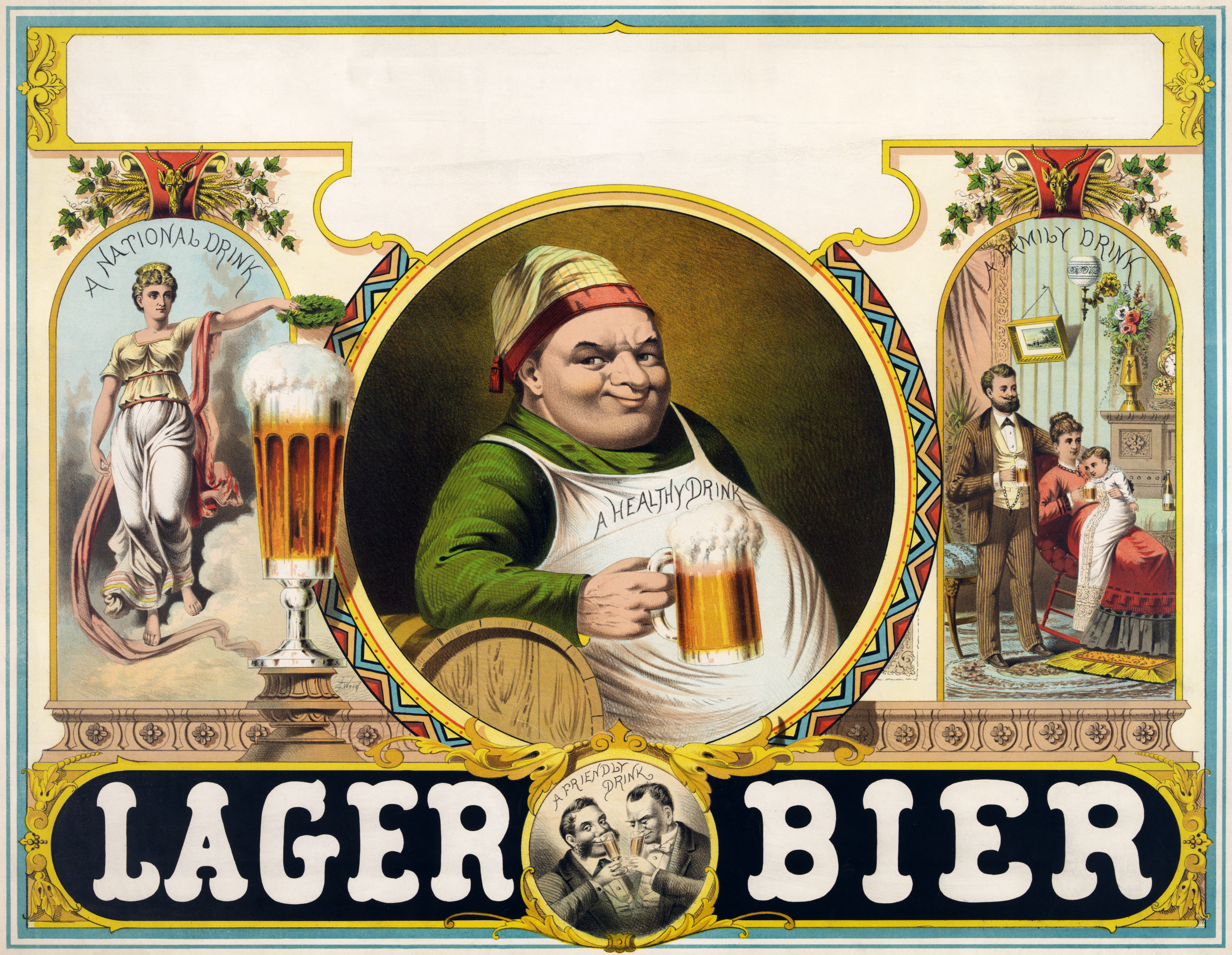 People drinking lager beer.